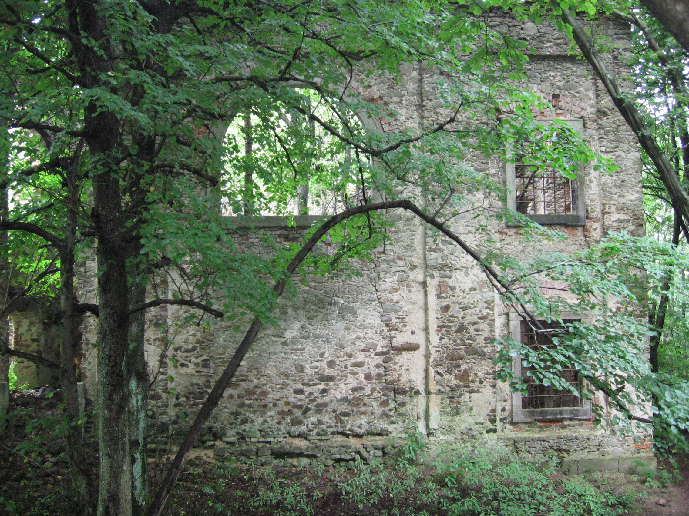 Außenansicht der Kirche von St. Apollonia